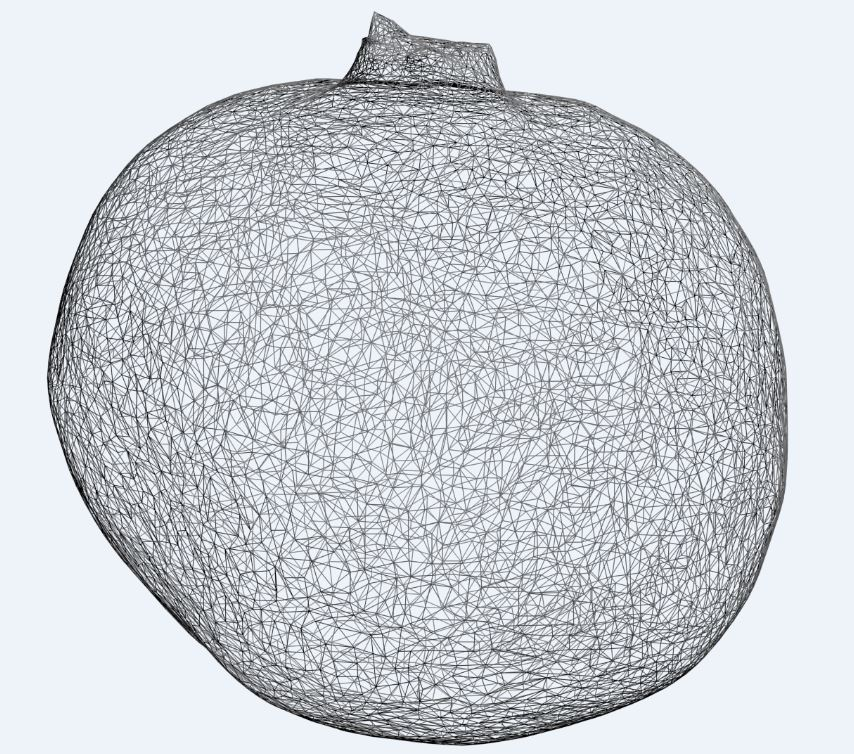 JPG eines Scanbull 3D Granatapfel Polygonenmusters